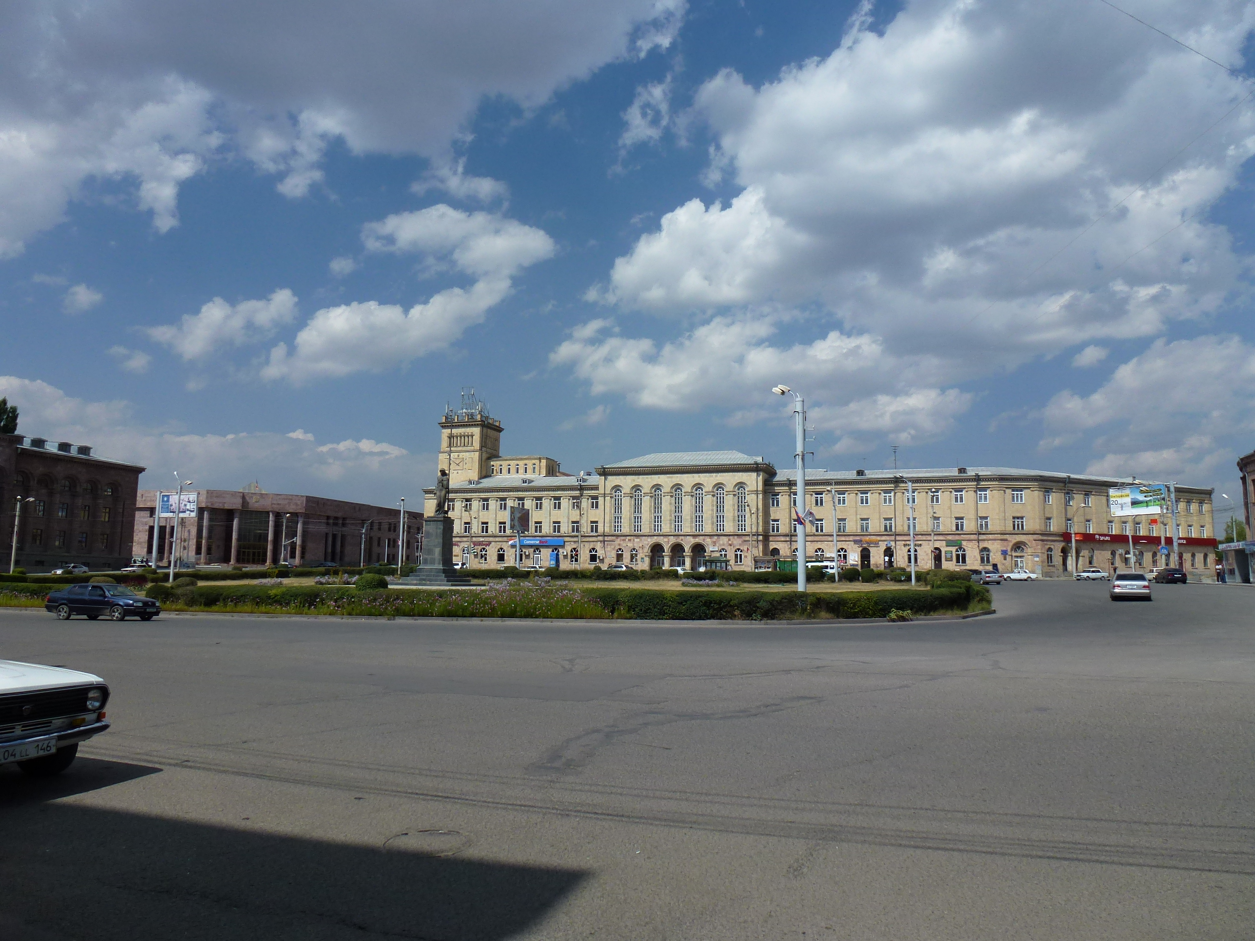 Գյումրիի Գուլպա նասկեղենի ֆաբրիական 1/27